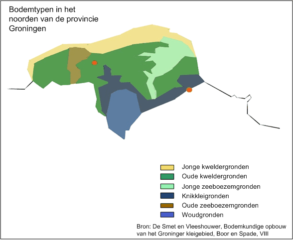 Zelf getekende kaart op basis van een kaart van L.A.H. de Smet en J.J. Vleeshouwer, De bodemkundige opbouw van het Groninger kleigebied, Boor en Spade, VIII, 1956, pp. 142-159